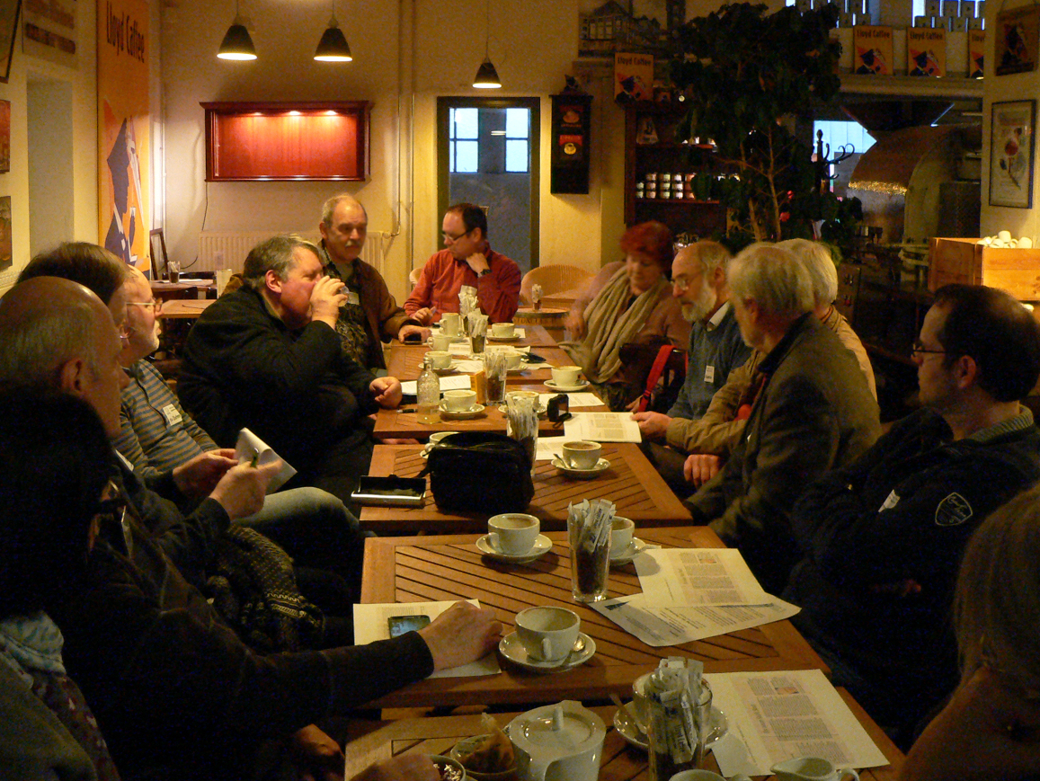 Kaffeeverkostung während eines „Kaffeeseminars“ der Lloyd Kaffeerösterei im Rösterei-Café; im früheren Kaffee-HAG-Werk I im Holz- und Fabrikenhafen in Bremen-Walle, Ortsteil Überseestadt.Hier: Treffen der Bremer Wikipedia-Community in der Lloyd Kaffeerösterei.